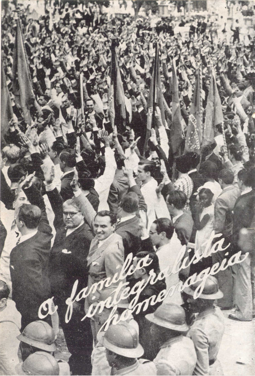 Na imagem é possível ver que a grande maioria dos civis presente eram integralistas.